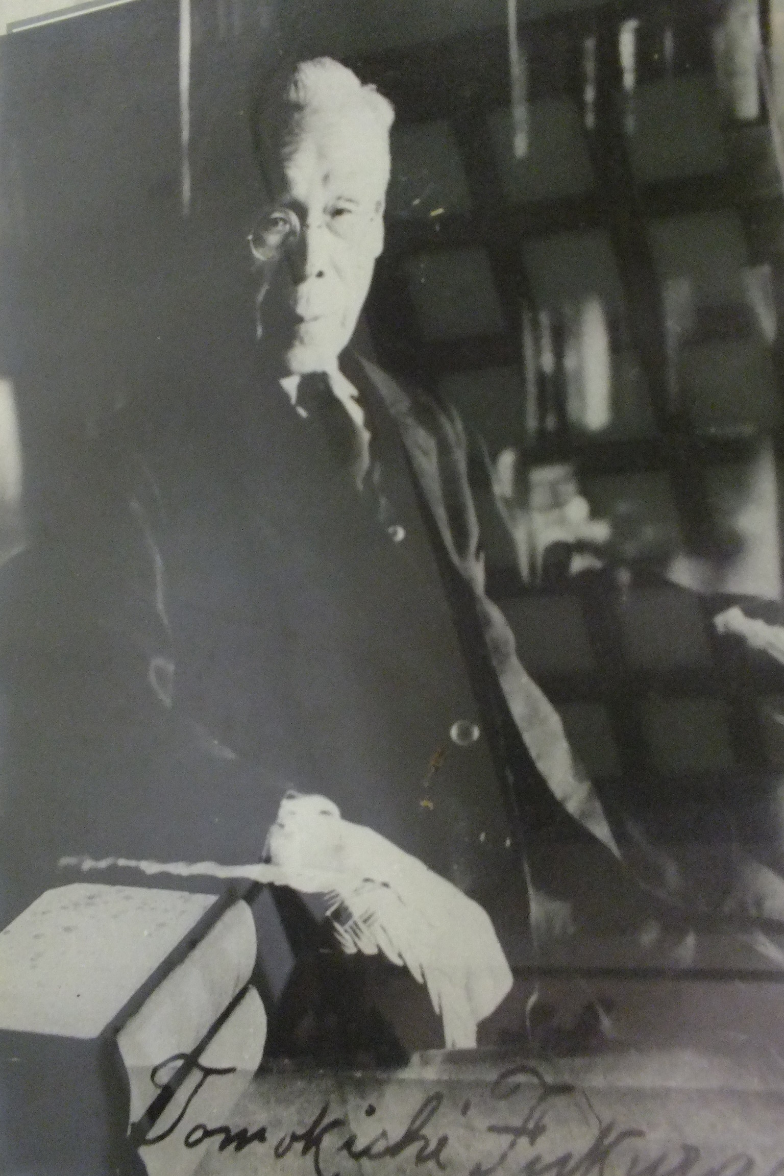 2017-07-01 Bust of Tomokichi Fukurai 福来友吉晩年 DSCF4811